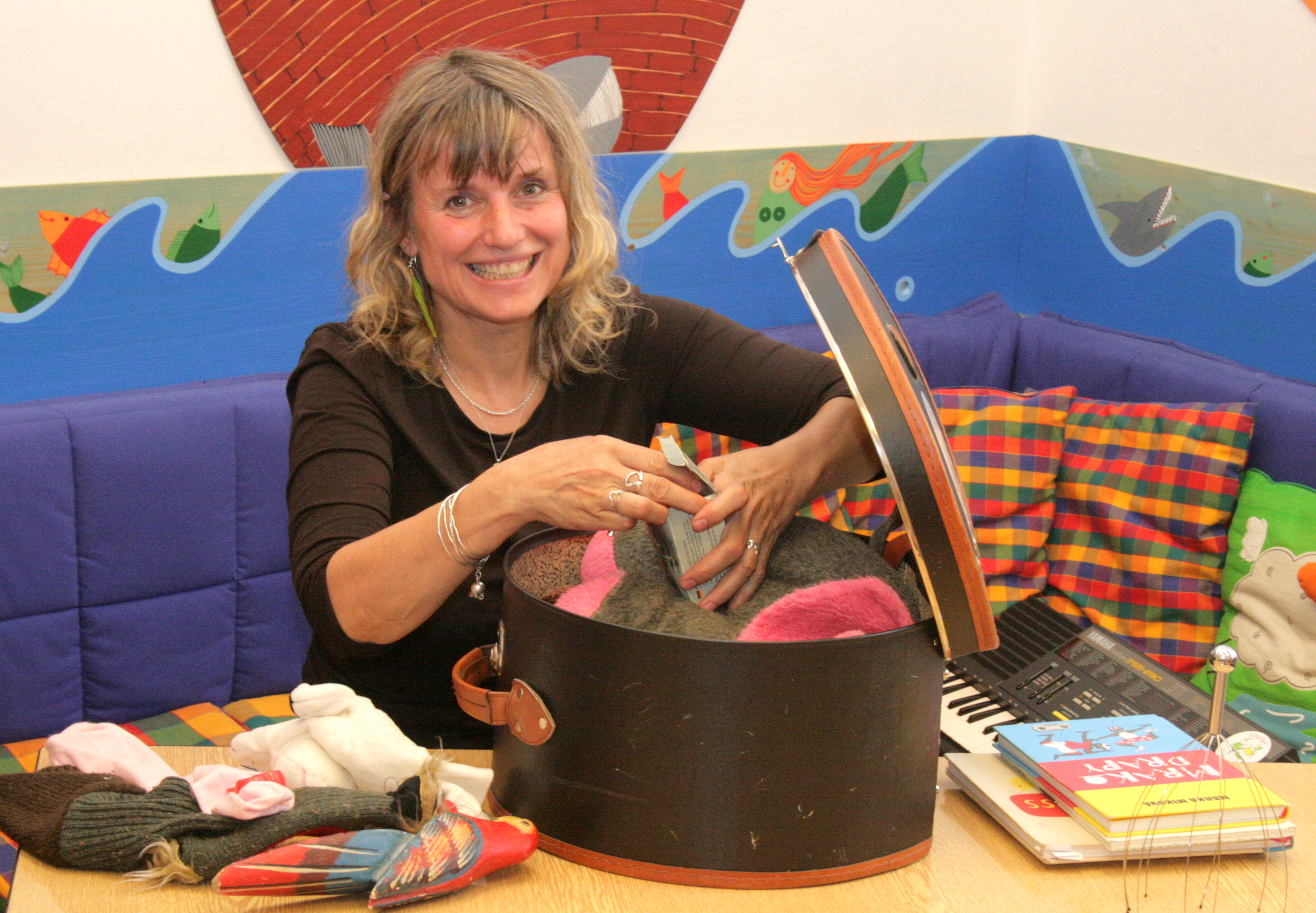 Marka Míková - beseda v dětském oddělení Knihovny města Plzně